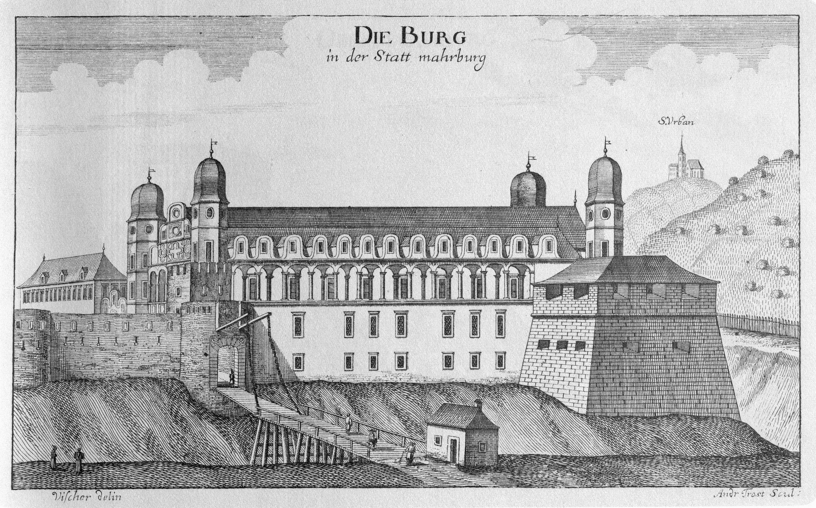 G. M. Vischers Käyserlichen Geographi, Topographia Ducatus Stiriae, Das ist: Eigentliche Delineation / und Abbildung aller Städte / Schlösser / Marcktfleck / Lustgärten / Probsteyen / Stiffter / Clöster und Kirchen / so es sich im Herzogthumb Steyrmarck befinden; Und anjetzo Umb einen billichen Preyß zu finden seynd Bey Johann Bitsch Universitäts Buchhandlern / Auff dem Juden=Platz bey der guldenen Saulen. Graz 1681 Die Nummerierung der Dateien folgt der alphabetischen Reihung der Ortsnamen